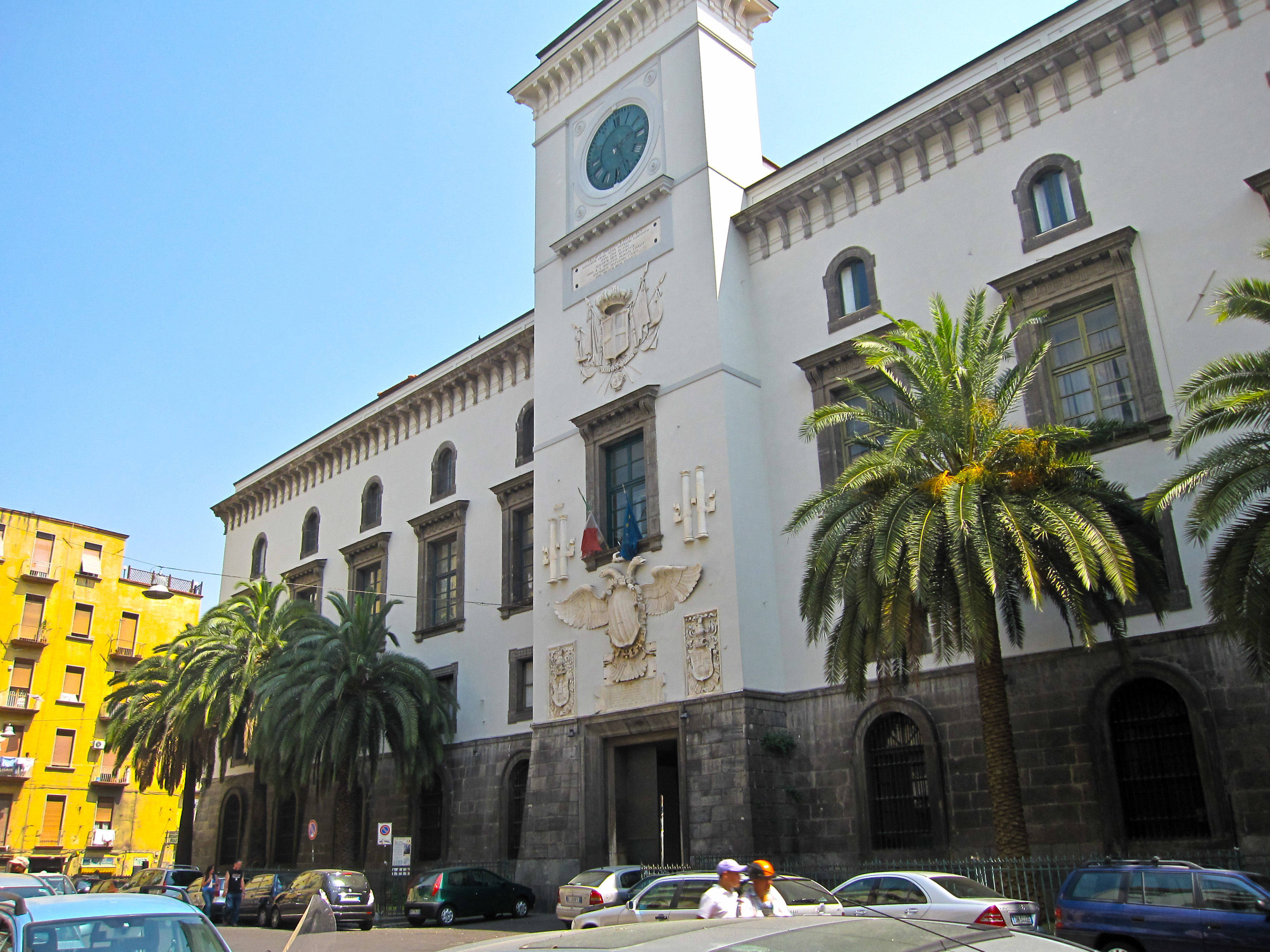 Castel Capuano. Facciata su via dei Tribunali - Napoli.